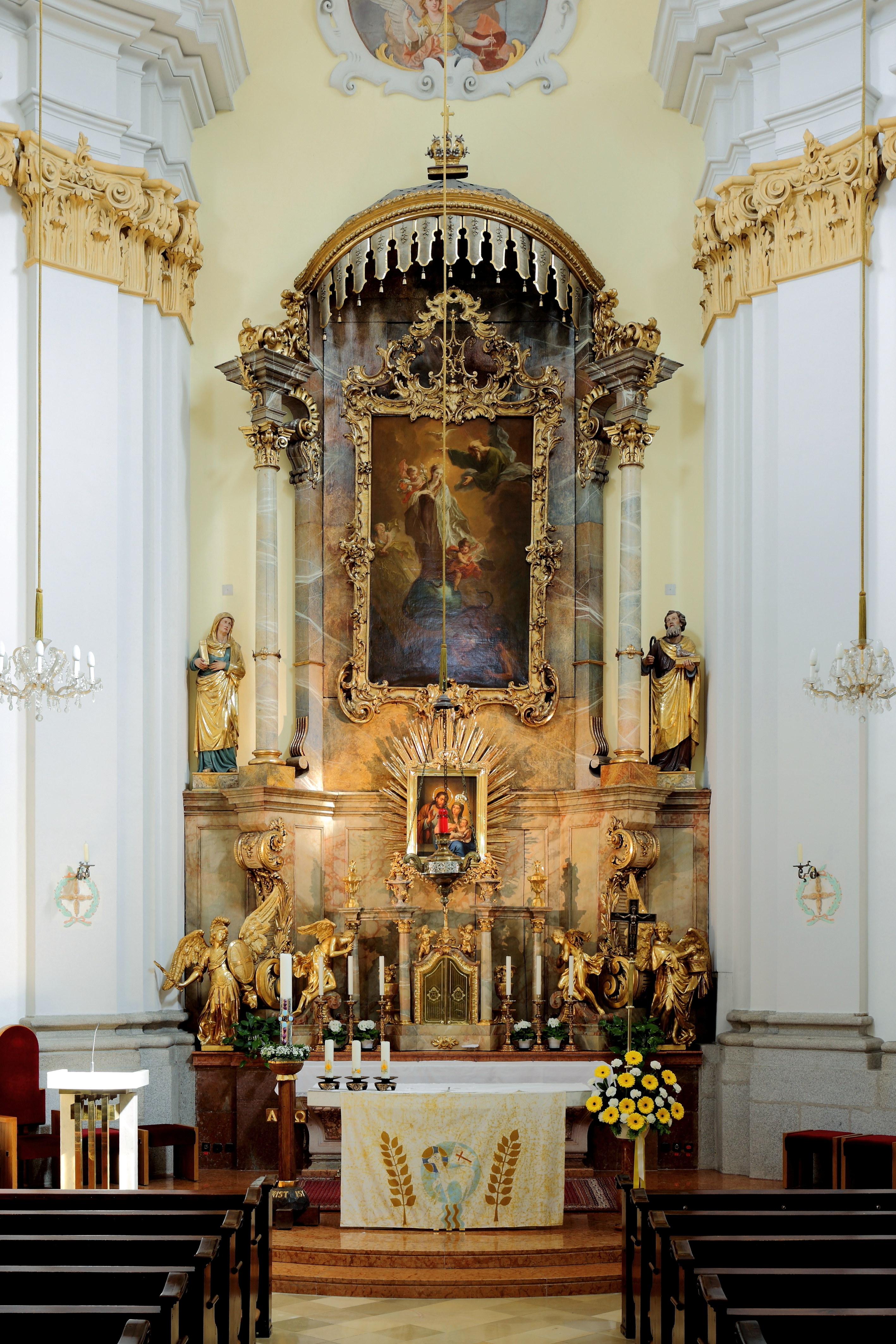 Hochaltar der Klosterkirche zur Unbefleckten Empfängnis Mariä der Barmherzigen Brüder in der oberösterreichischen Hauptstadt Linz. Das Hochaltarbild mit dem Motiv Maria Immaculata (die Unbefleckte Empfängnis Mariä) schuf Martin Johann Schmidt und ist mit 1773 datiert.